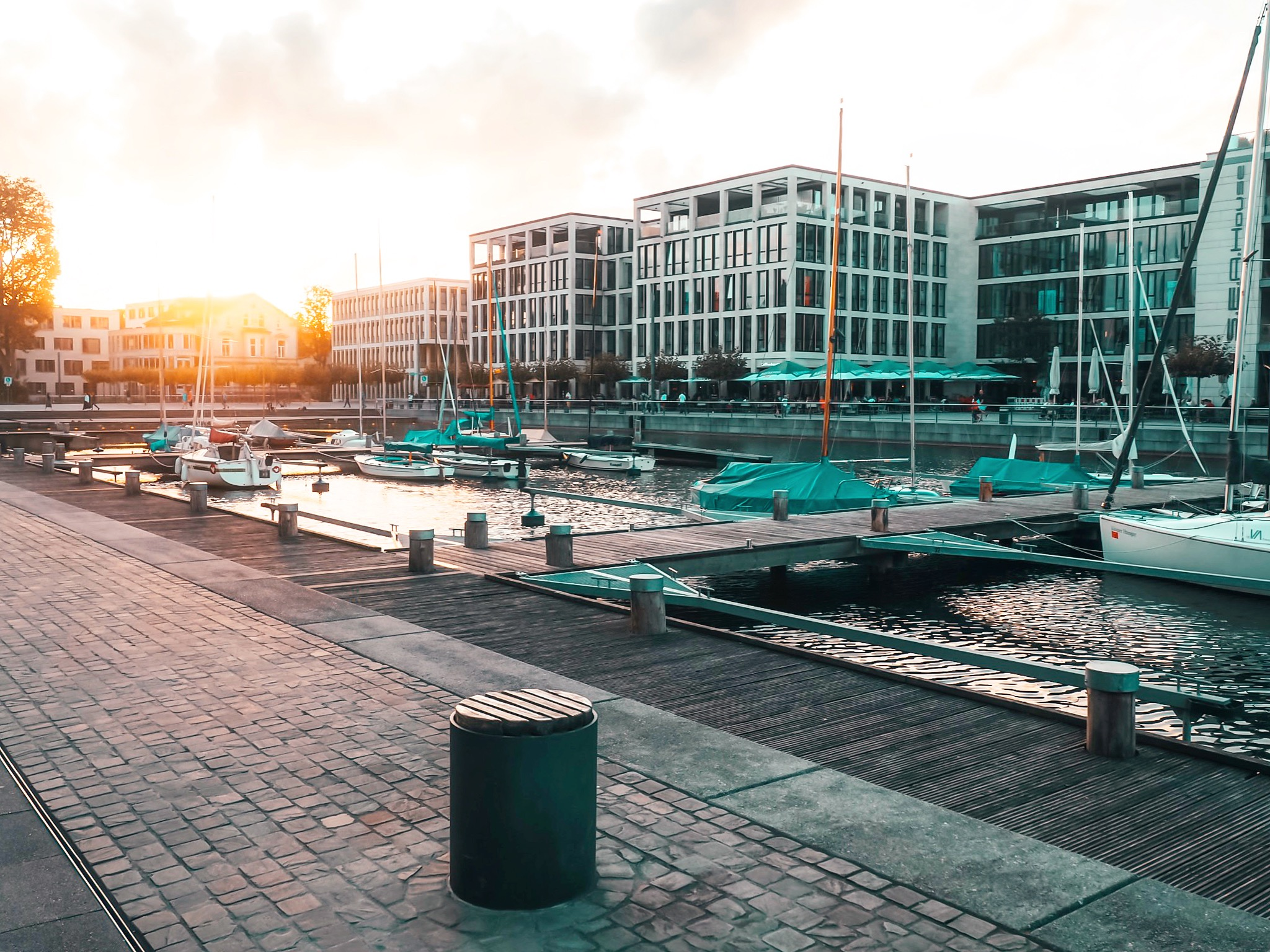 Hafenbecken Phoenixsee